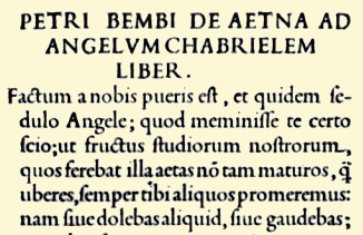 Originalsatz der Pietro Bembo aus De Aetna, 1495